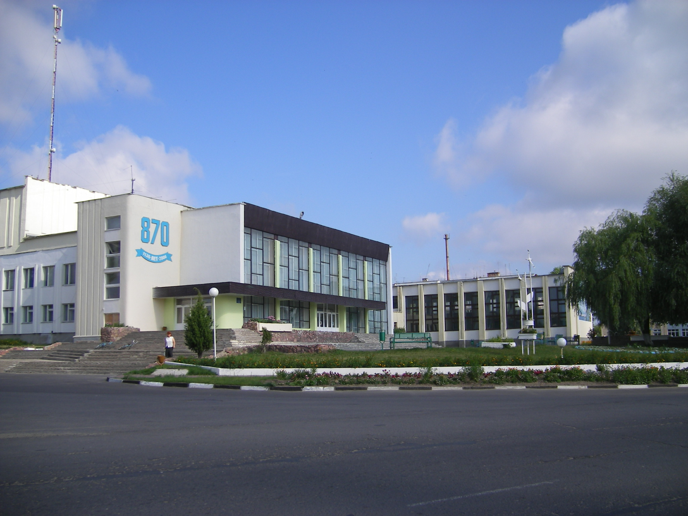 Slawharad, street view